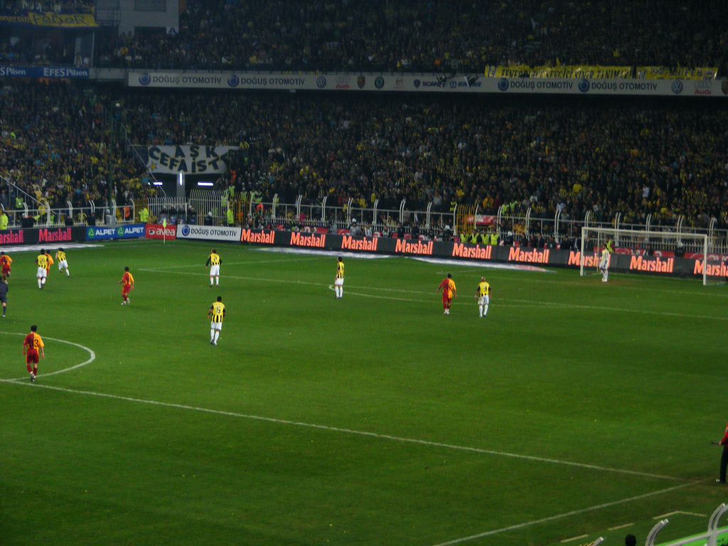 Fenerbahçe - Galatasaray match in 8 December 2007